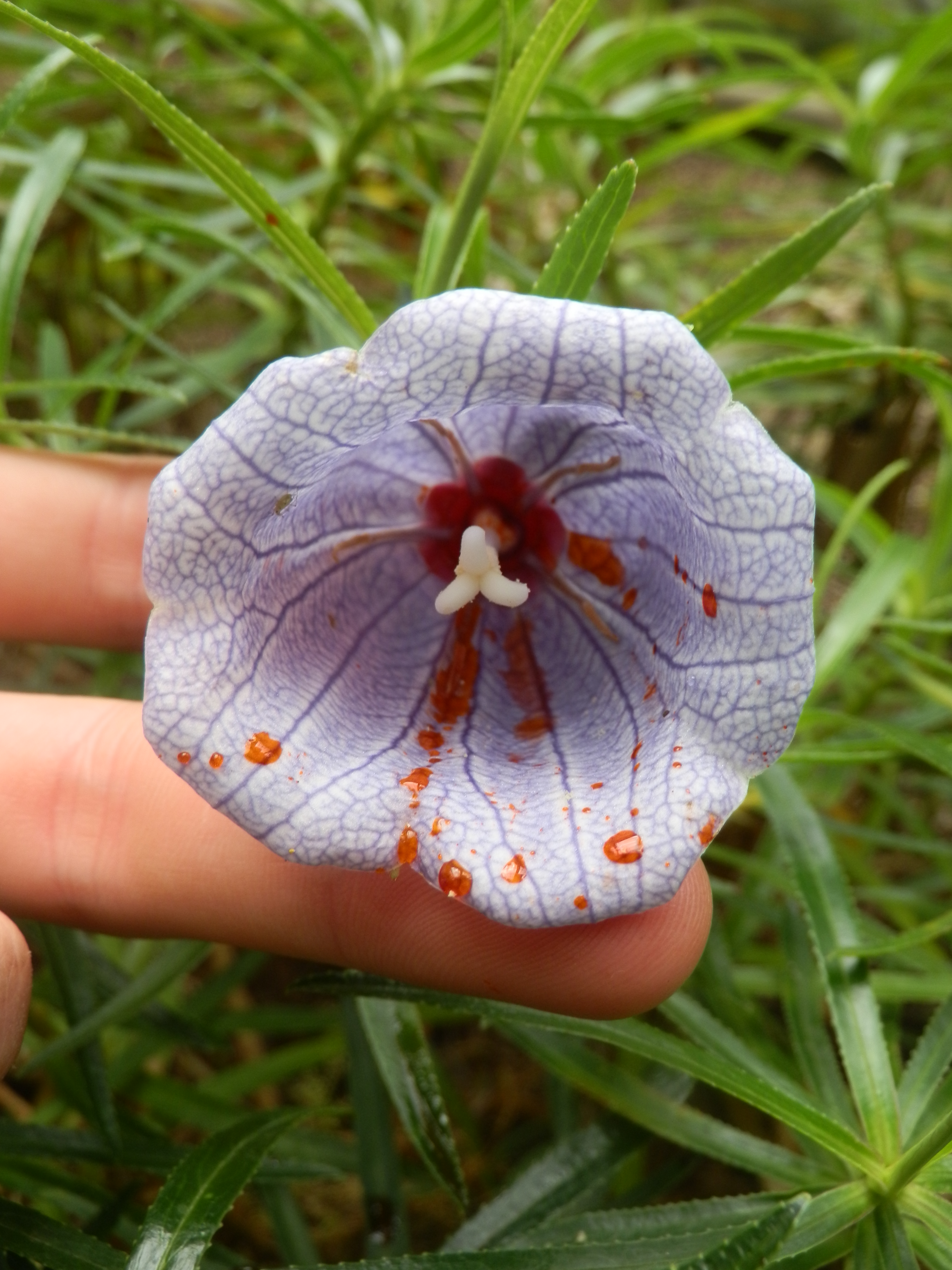 Floraison